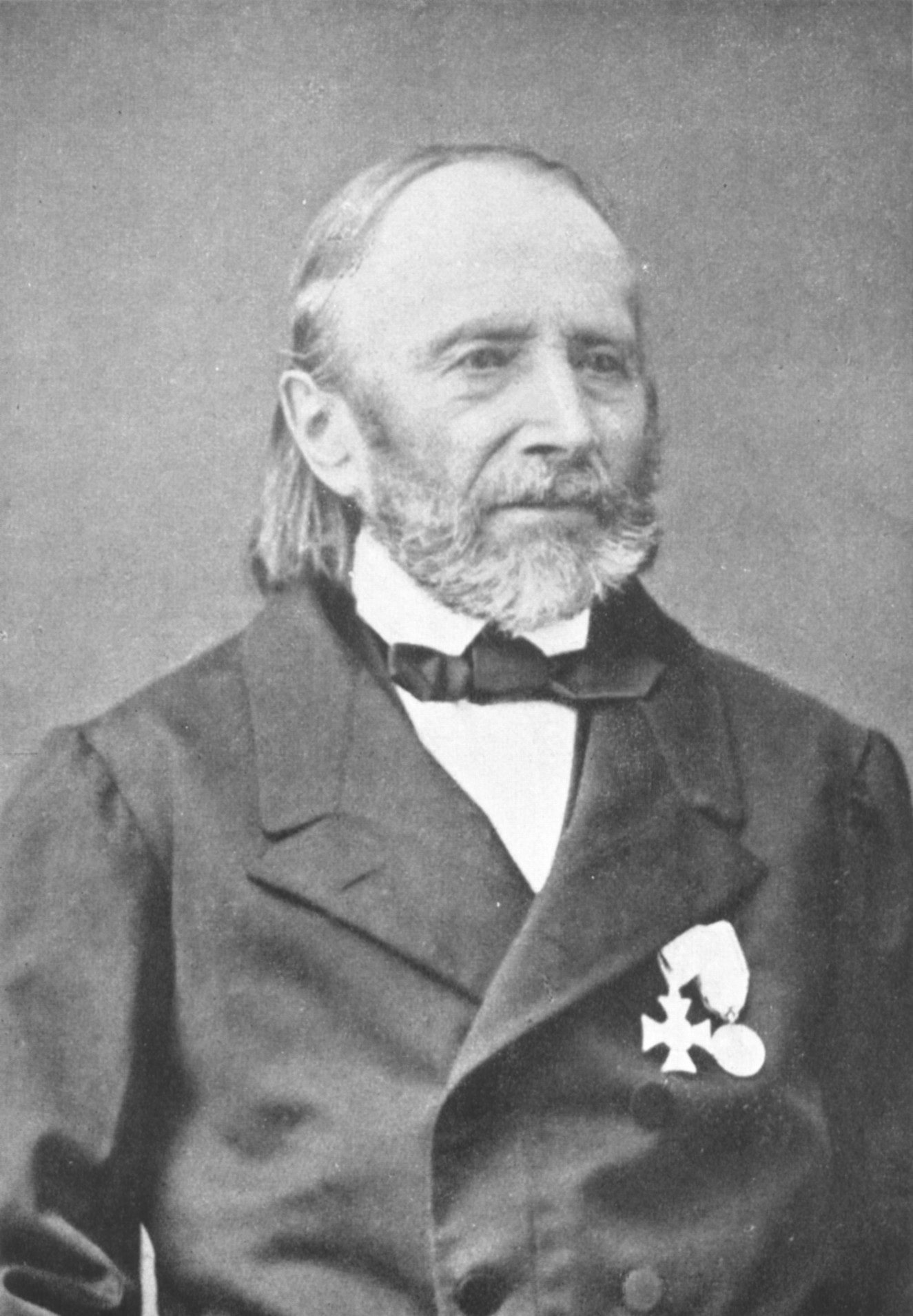 Bernhard Nickel (1794–1879), Waldinspektor (Förster) in Heilbronn, Stadtrat und Abgeordneter